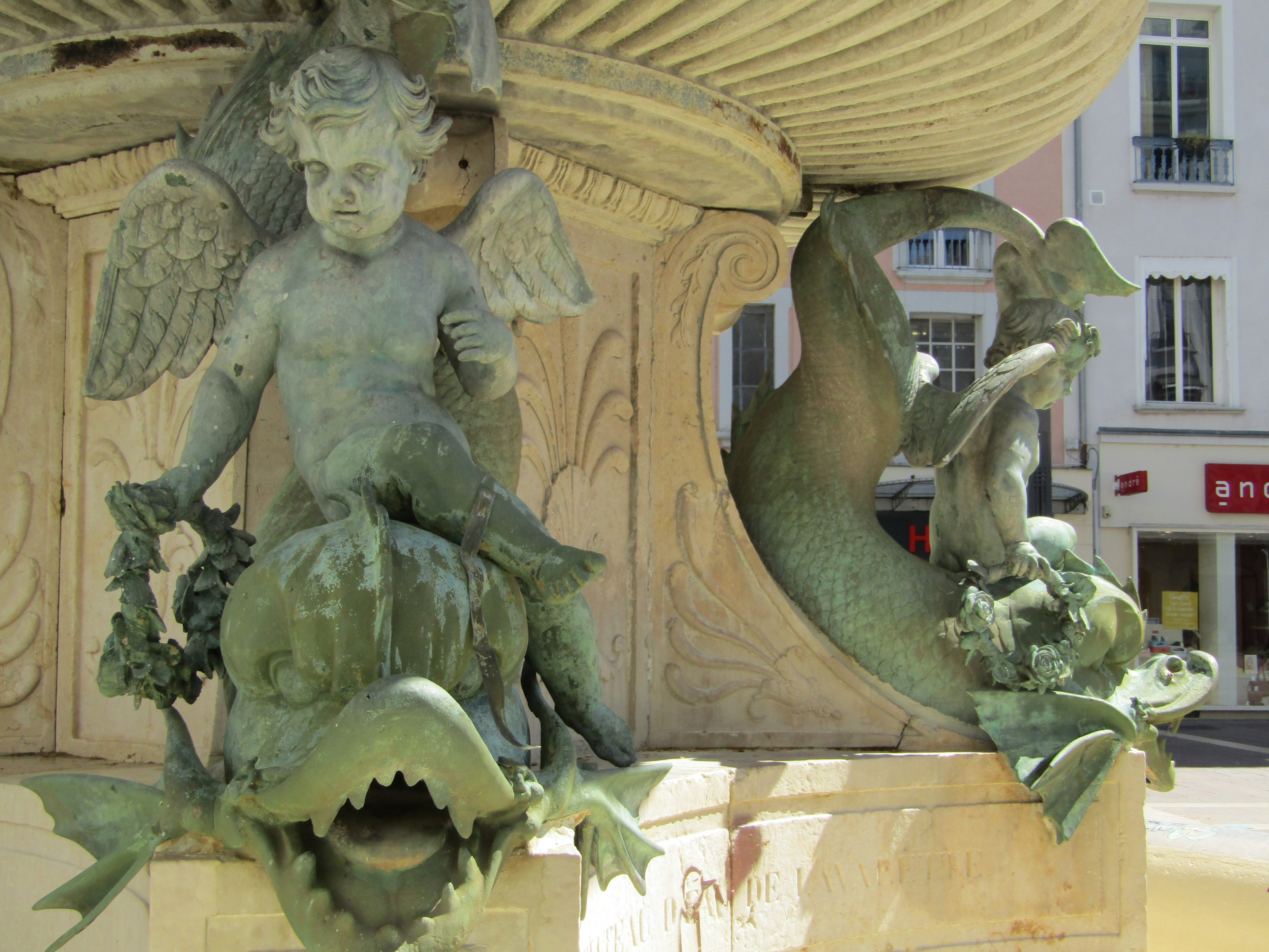 Détail du château d'eau (Fontaine) de la place Grenette en avril 2019